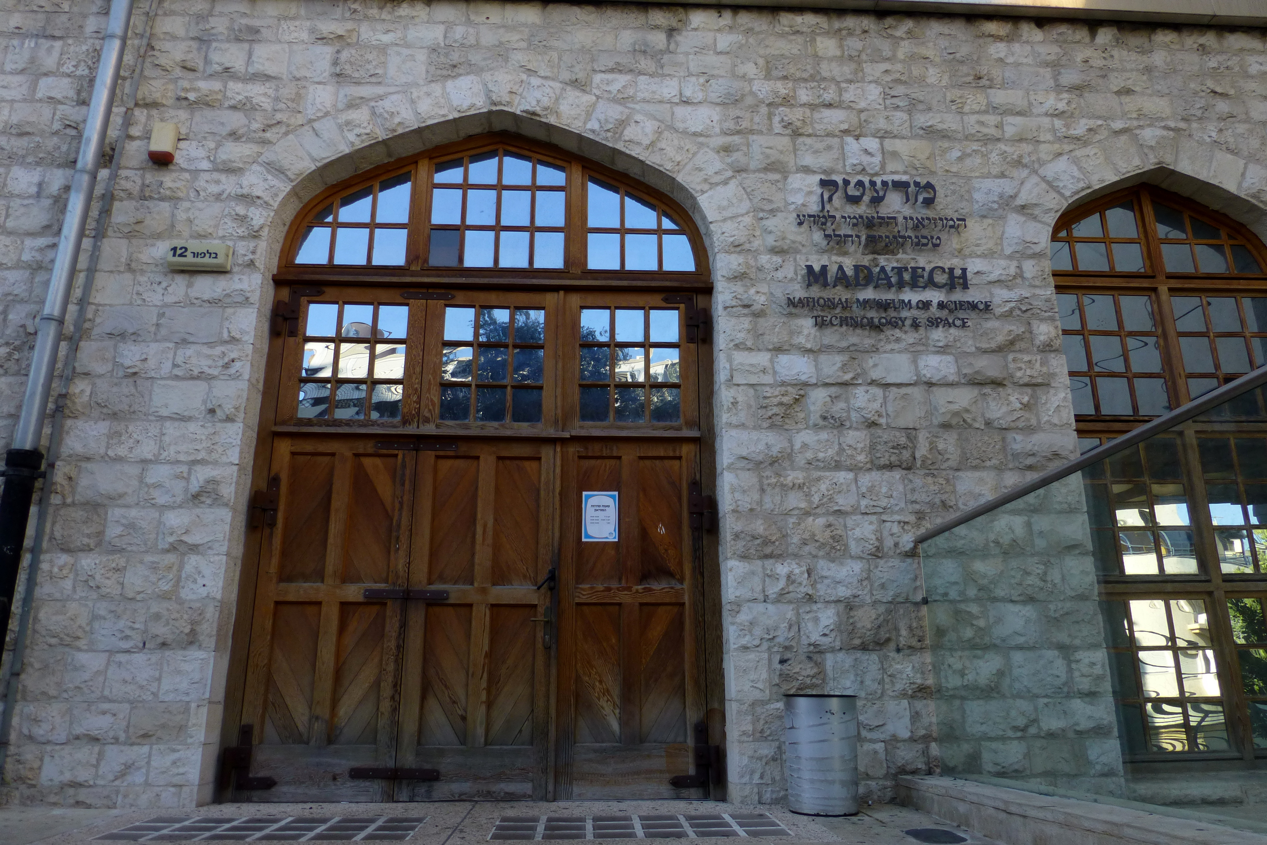 בניין הטכניון ההיסטורי בשכונת הדר כרמל בחיפה